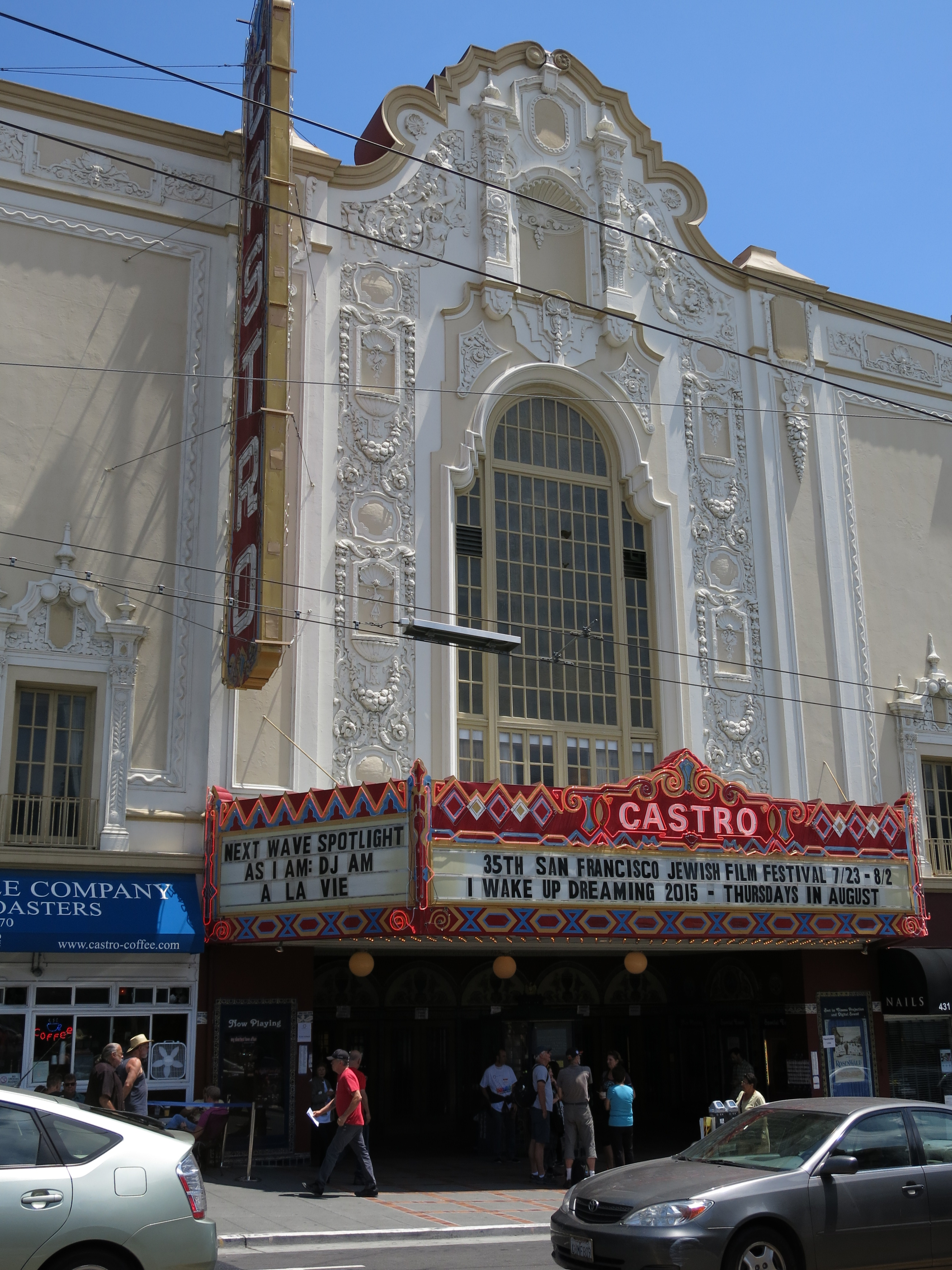 Castro Theatre, historisches Kino in Castro Street in San Francisco